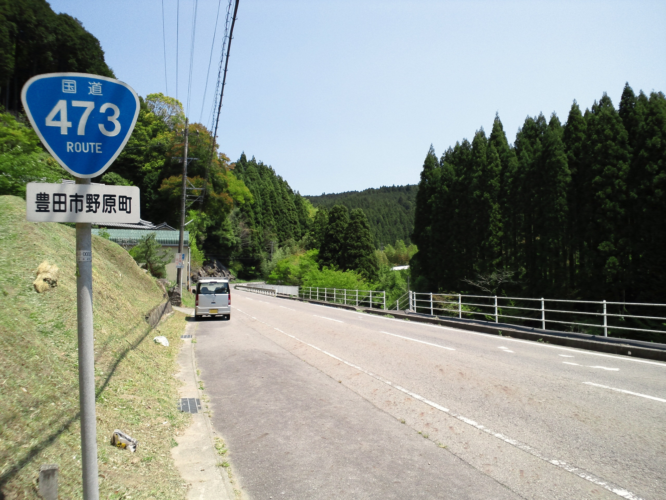 豊田市野原町付近の国道473号。